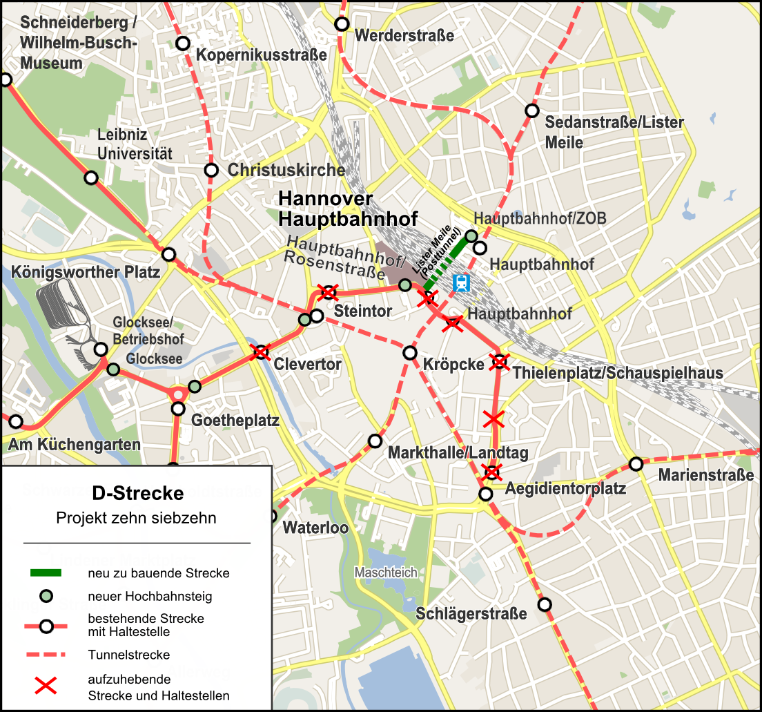 Ausbau D-Strecke Innenstadt: Entwurf der Region von 2012, angepasst nach Verzicht auf den Abriss der Raschplatz-Hochstraße.